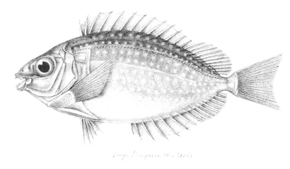 Siganus sutor